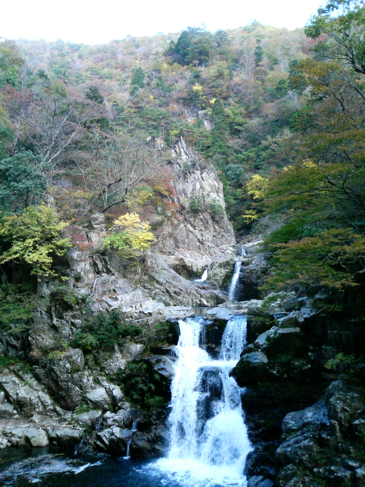 Sandankyo